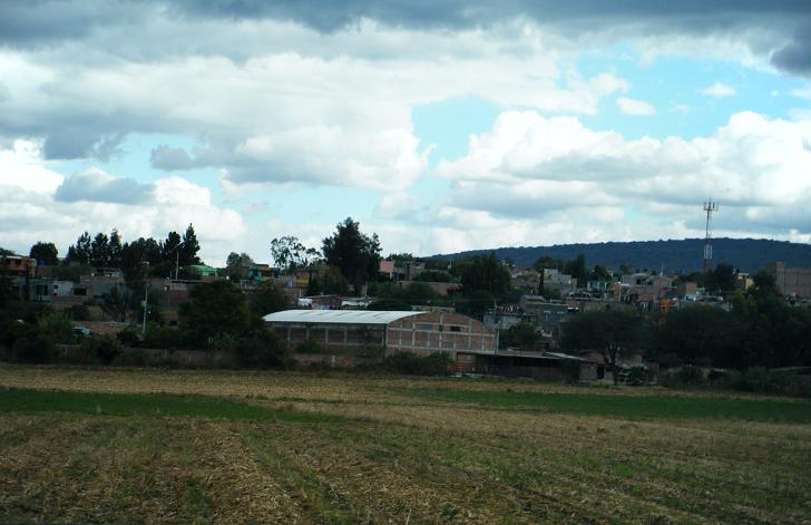 Urangato - Colonia Lázaro Cardenas